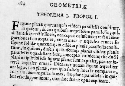 Cavalier's manuscript